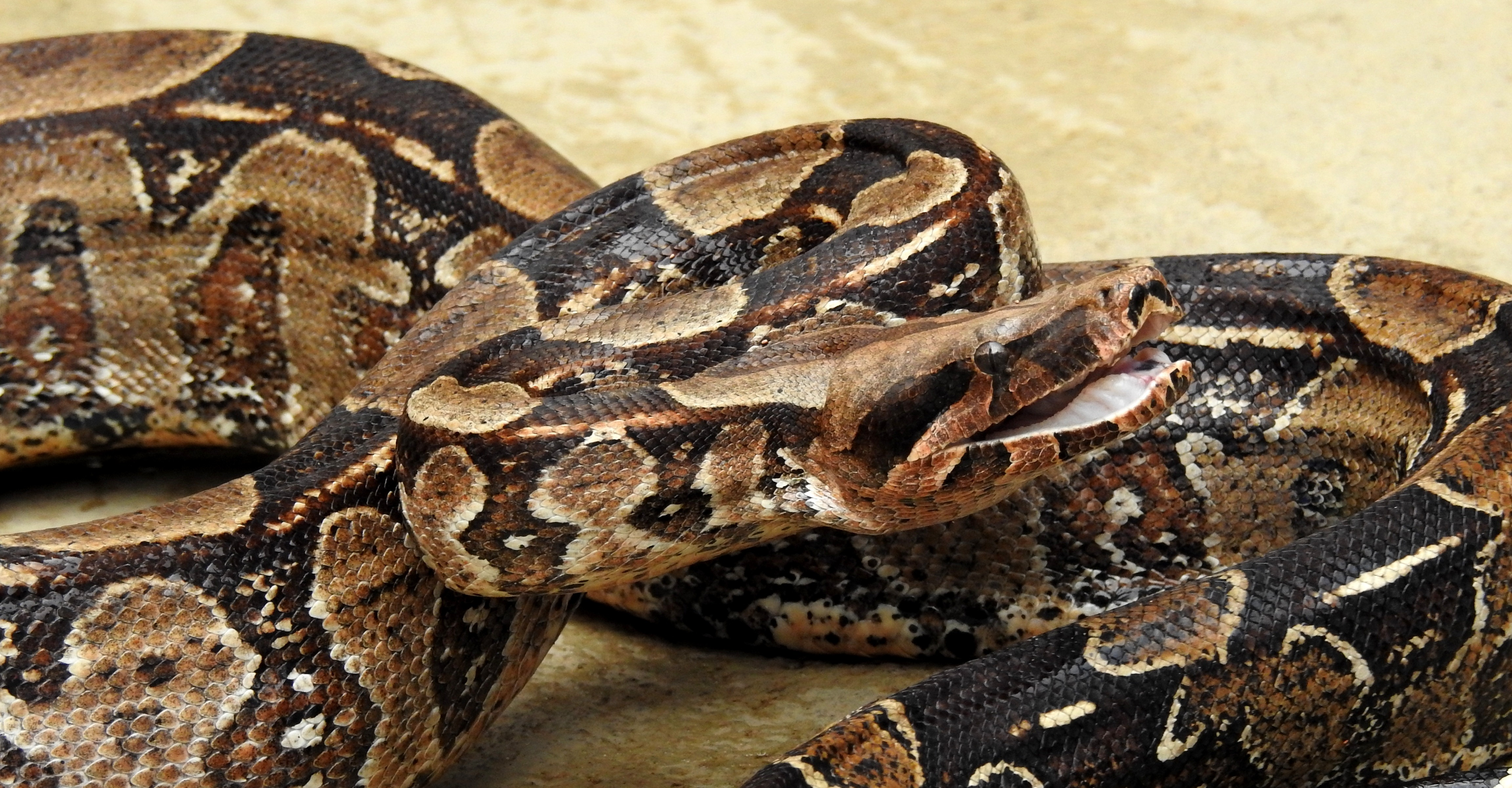 Serpente fotografada em Viçosa, Minas Gerais.